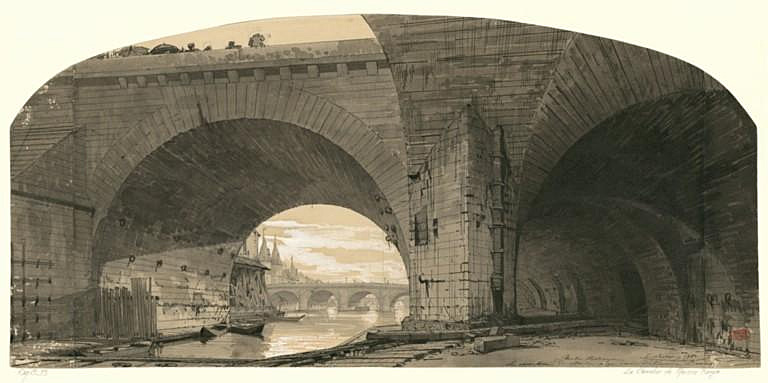 Le chevalier de Maison Rouge : esquisse de décor de l'acte V, tableau 11 : une berge sous le pont de Notre-Dame